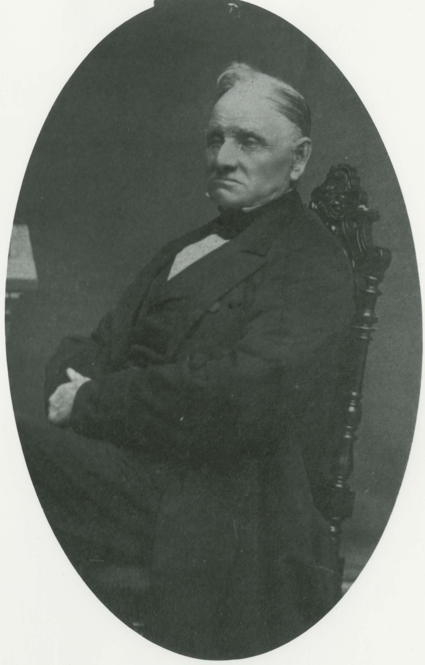 Enos Collins